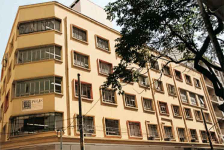 foto polis